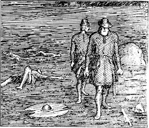 Halfdan Egedius: Illustration for Olav den helliges saga. Snorre 1899-edition. «Torgils og Grim fører Olavs Lig bort.» nb: «Torgils og Grim fører Olavs lik bort.» nn: «Torgils og Grim fører bort liket til kong Olav.»